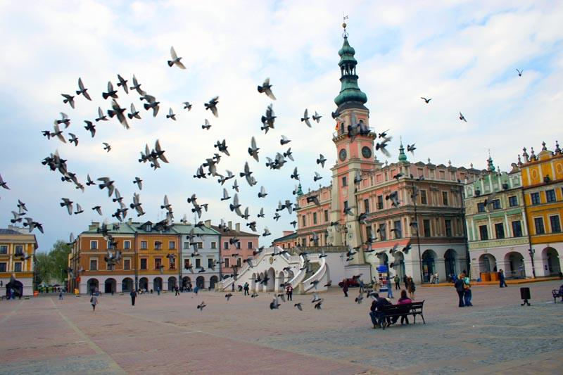 Zamosc (Poland)